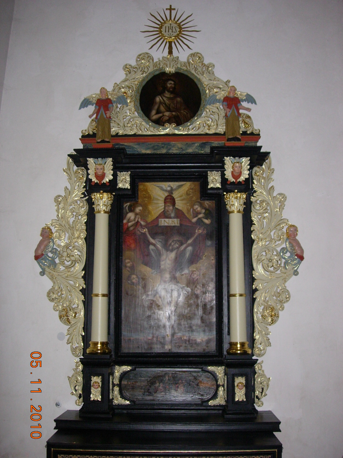 Ołtarz "Ecce Homo" (XVIII wiek) Kolegiata św. Mateusza Ap. w Nowym Stawie